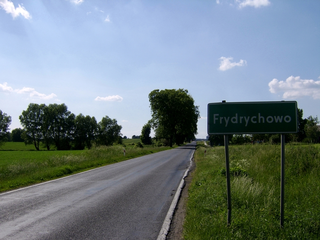 Wieś Frydrychowo